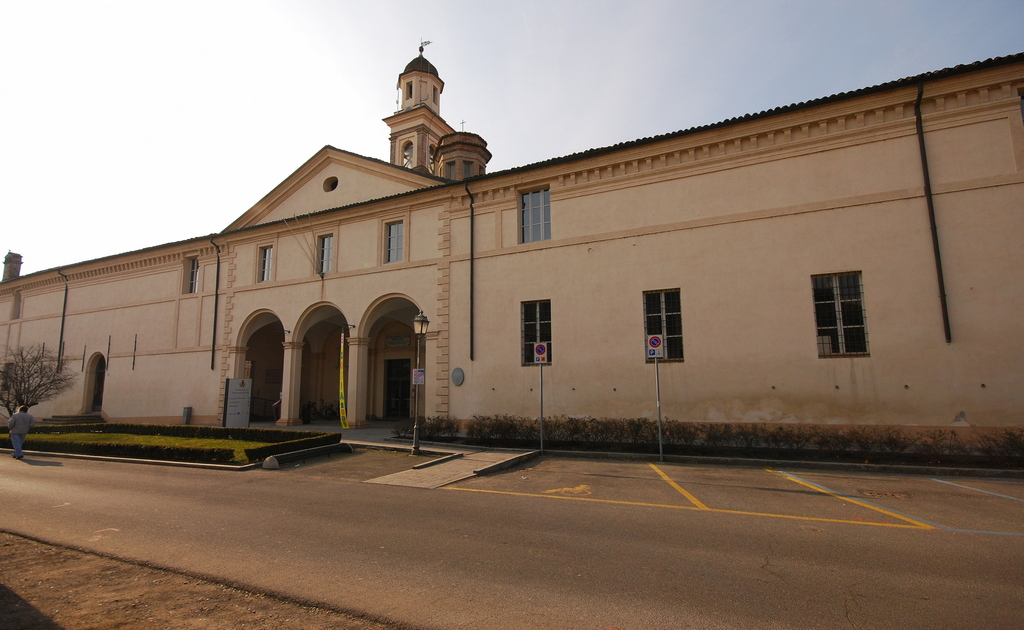 Ex Convento San Giovanni